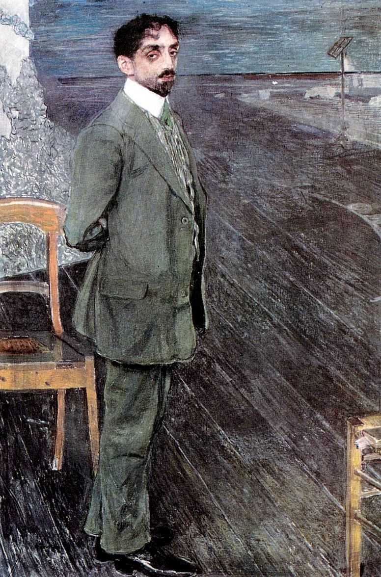 Головин Александр. Портрет М.А.Кузмина. 1910